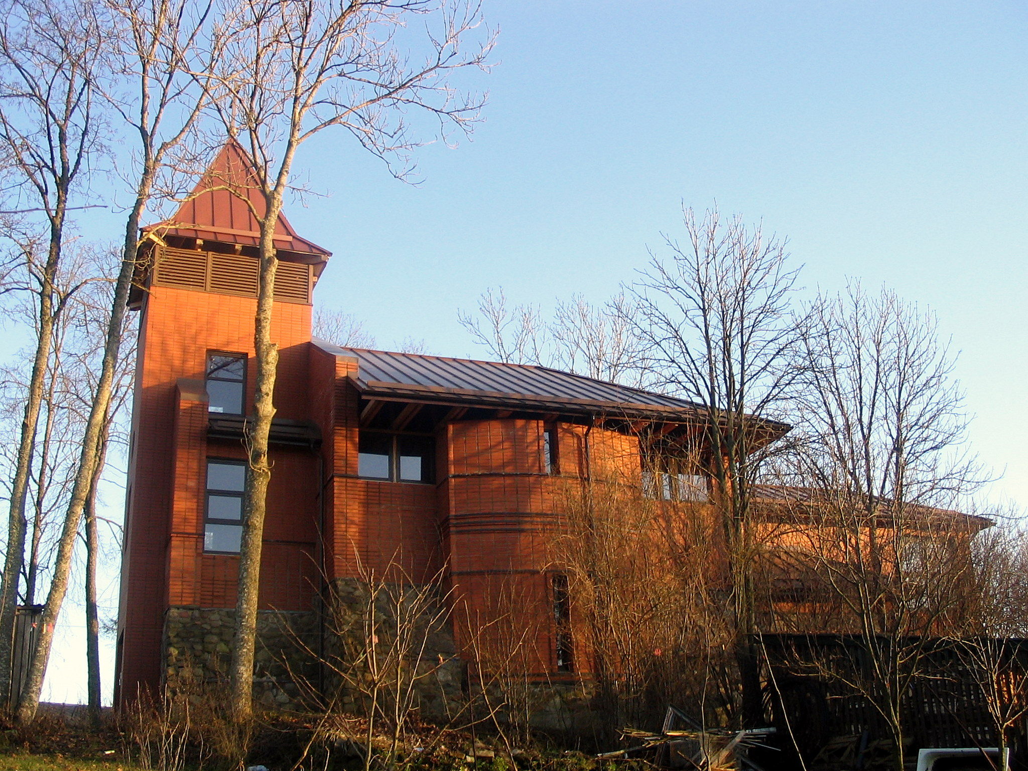 Kalnu Svētās Agnijas katoļu draudze